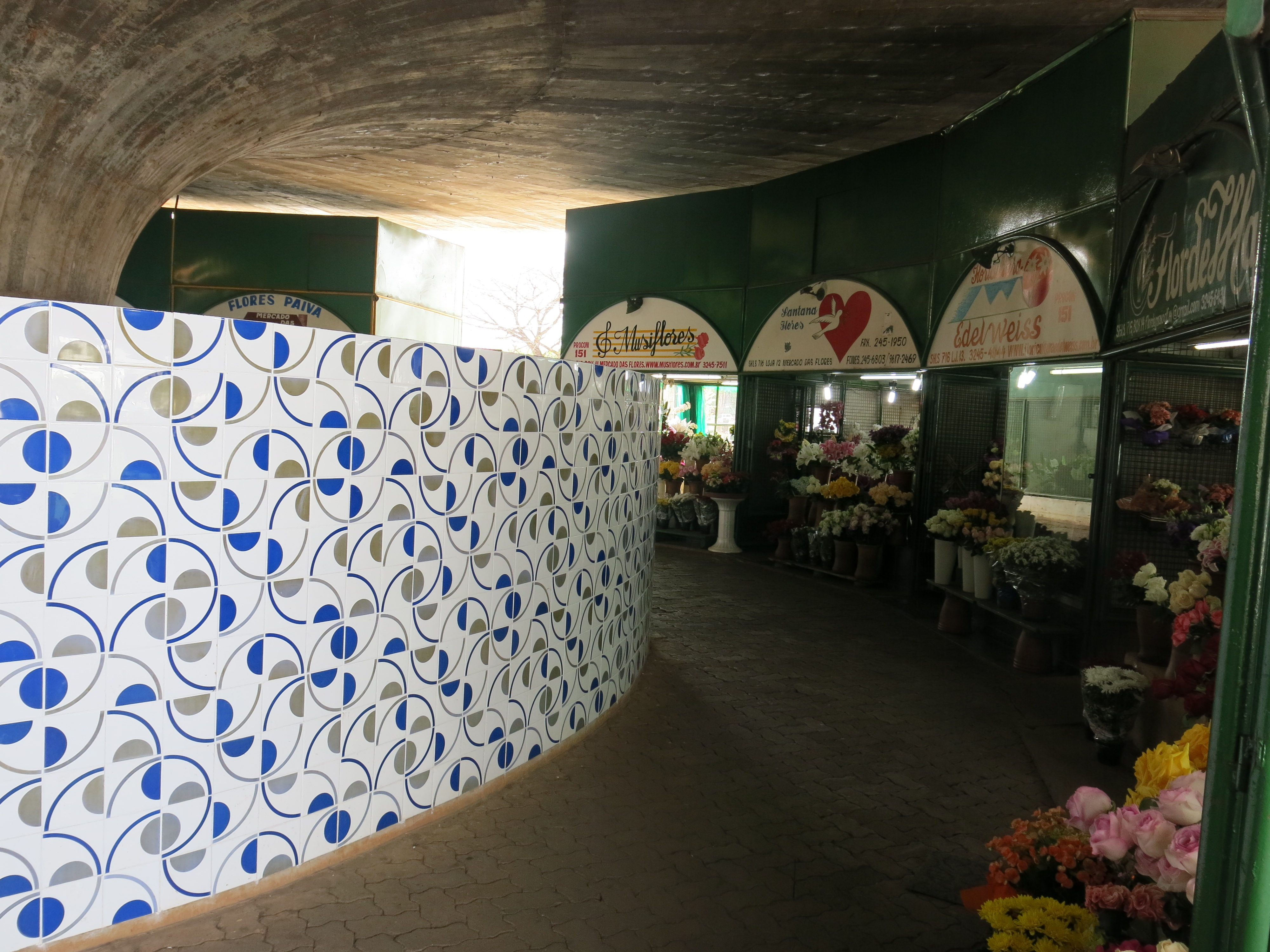 Mercado das Flores, em Brasília, com painel de azulejos do artista plástico Athos Bulcão.